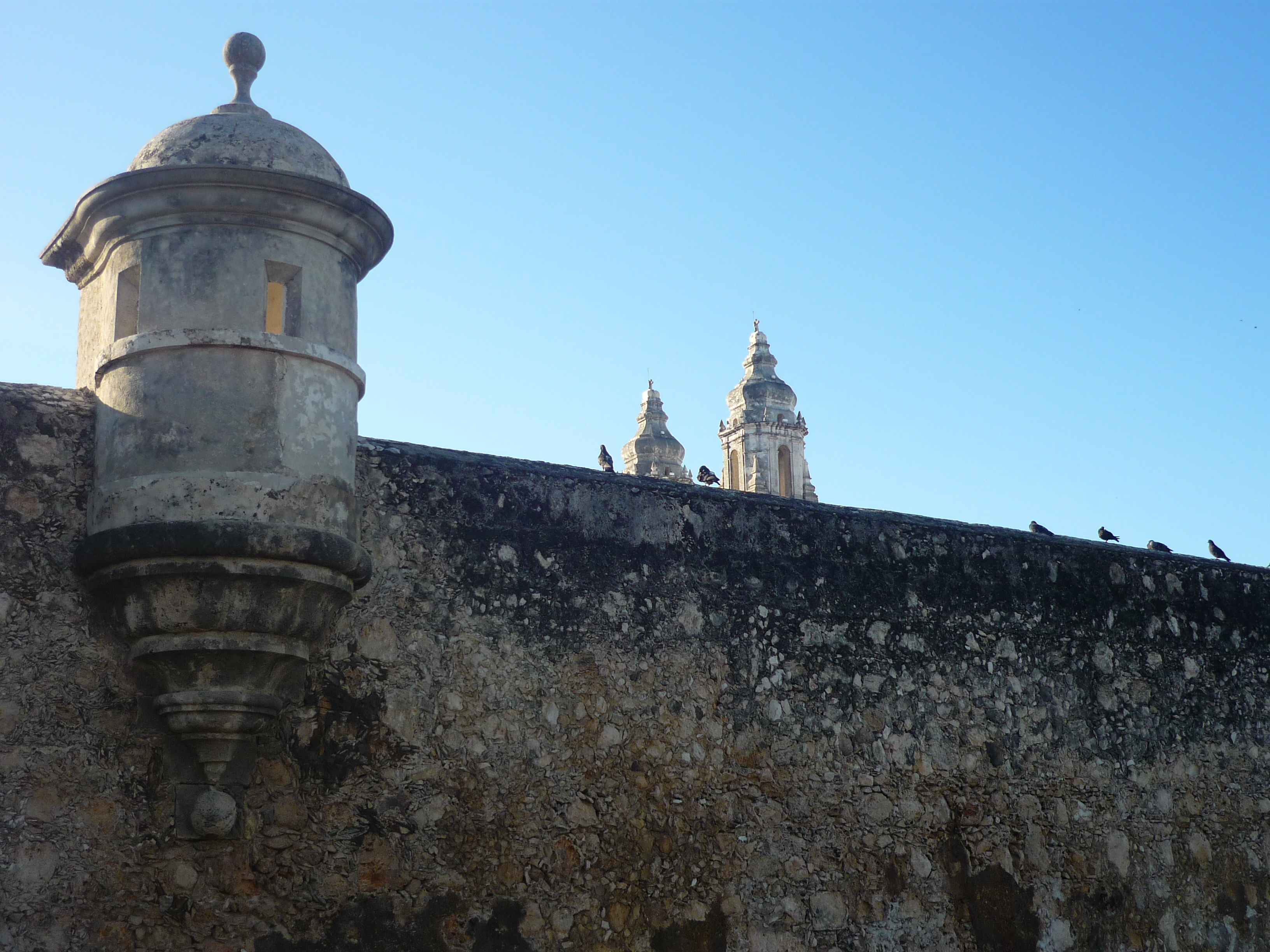 MURALLA — presidio de San Francisco de Campeche.